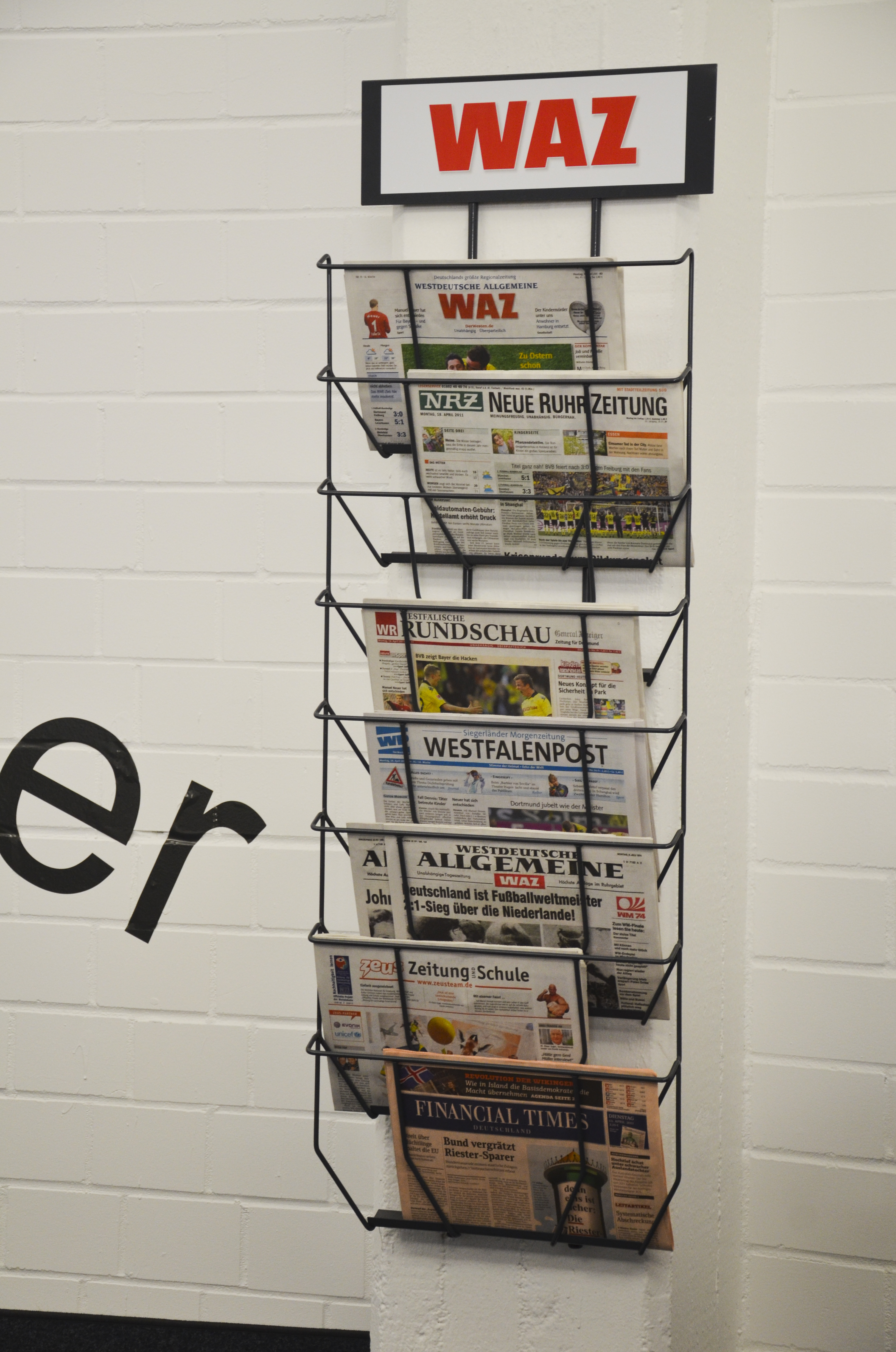 Druckhaus der WAZ Mediengruppe in Essen: verschiedene Zeitungen aus dem Medienkonzern bzw. im Druckhaus hergestellt.